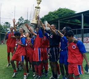 Equipe de Juniores do Futuro Bem Próximo AC, campeã iguaçuana de juniores em 2005.